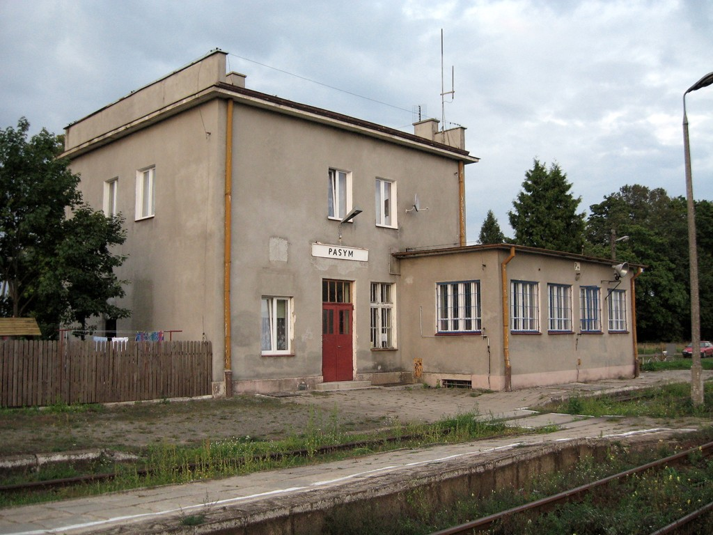 Budynek stacji kolejowej w Pasymiu